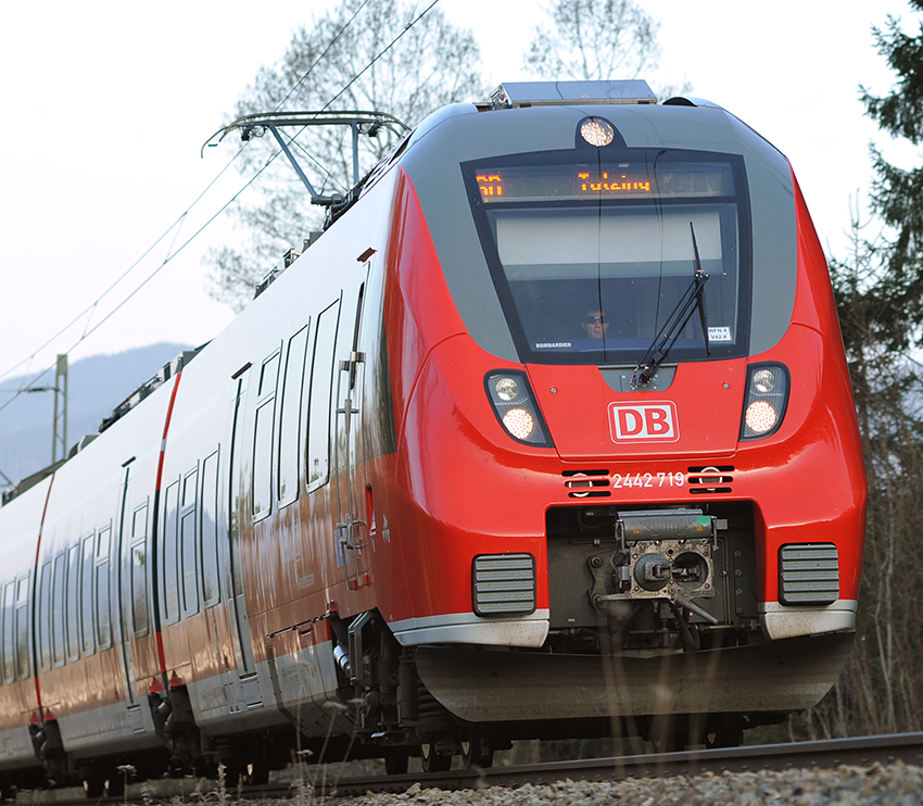 Ein Talent der Kochelseebahn